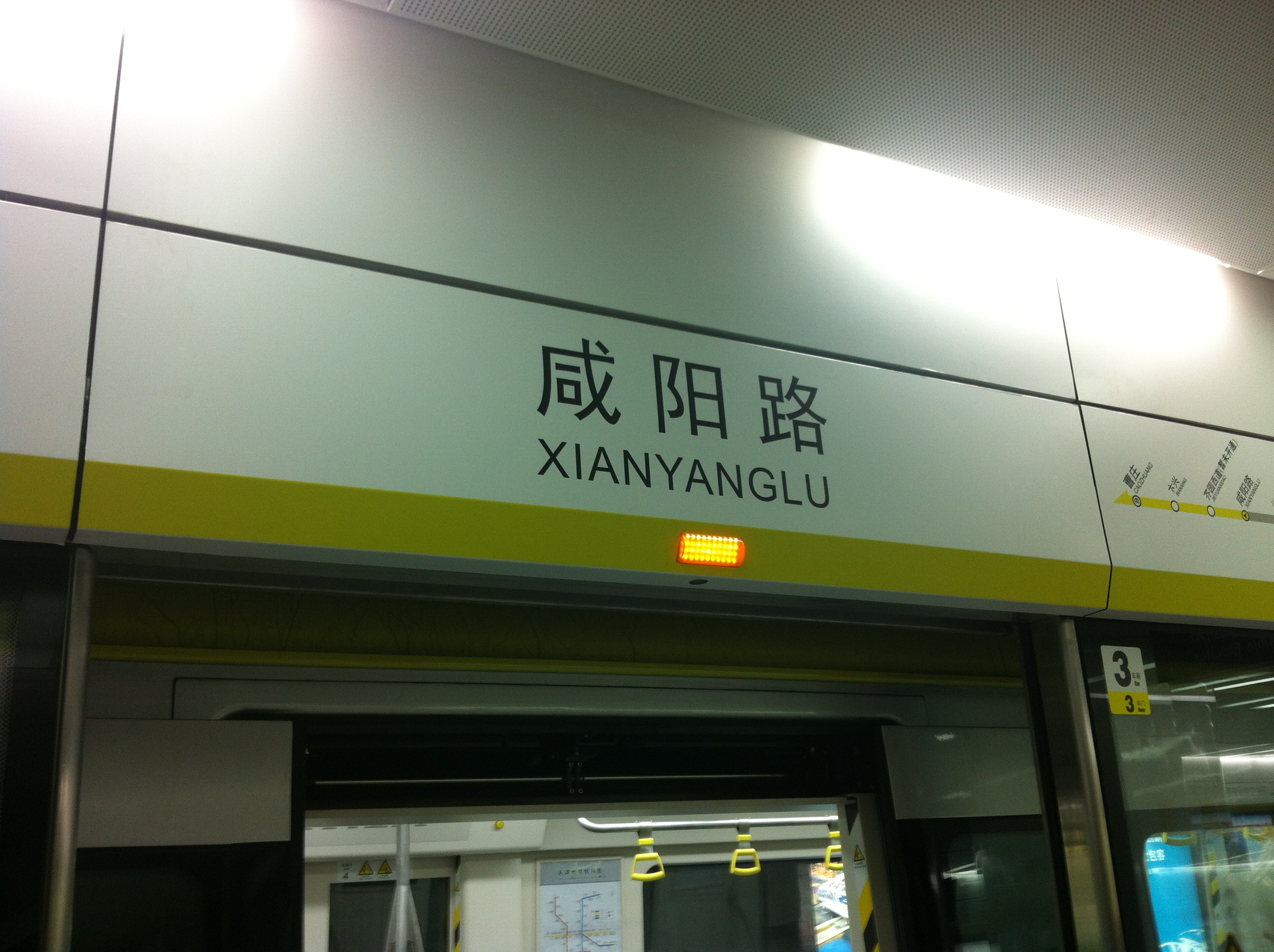 中文（中国大陆）: 天津地铁二号线咸阳路站